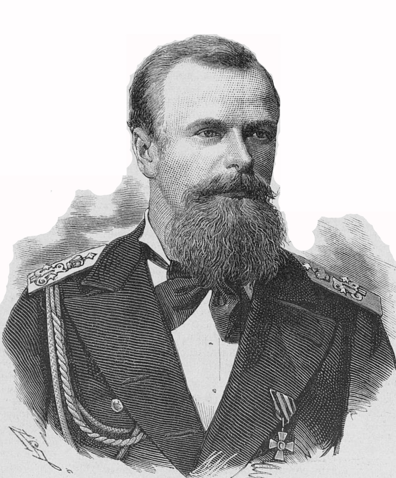 Капитан 2-го ранга Макаров Степан Осипович, 1878 год